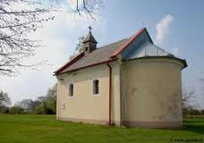 kostolík panny Márie